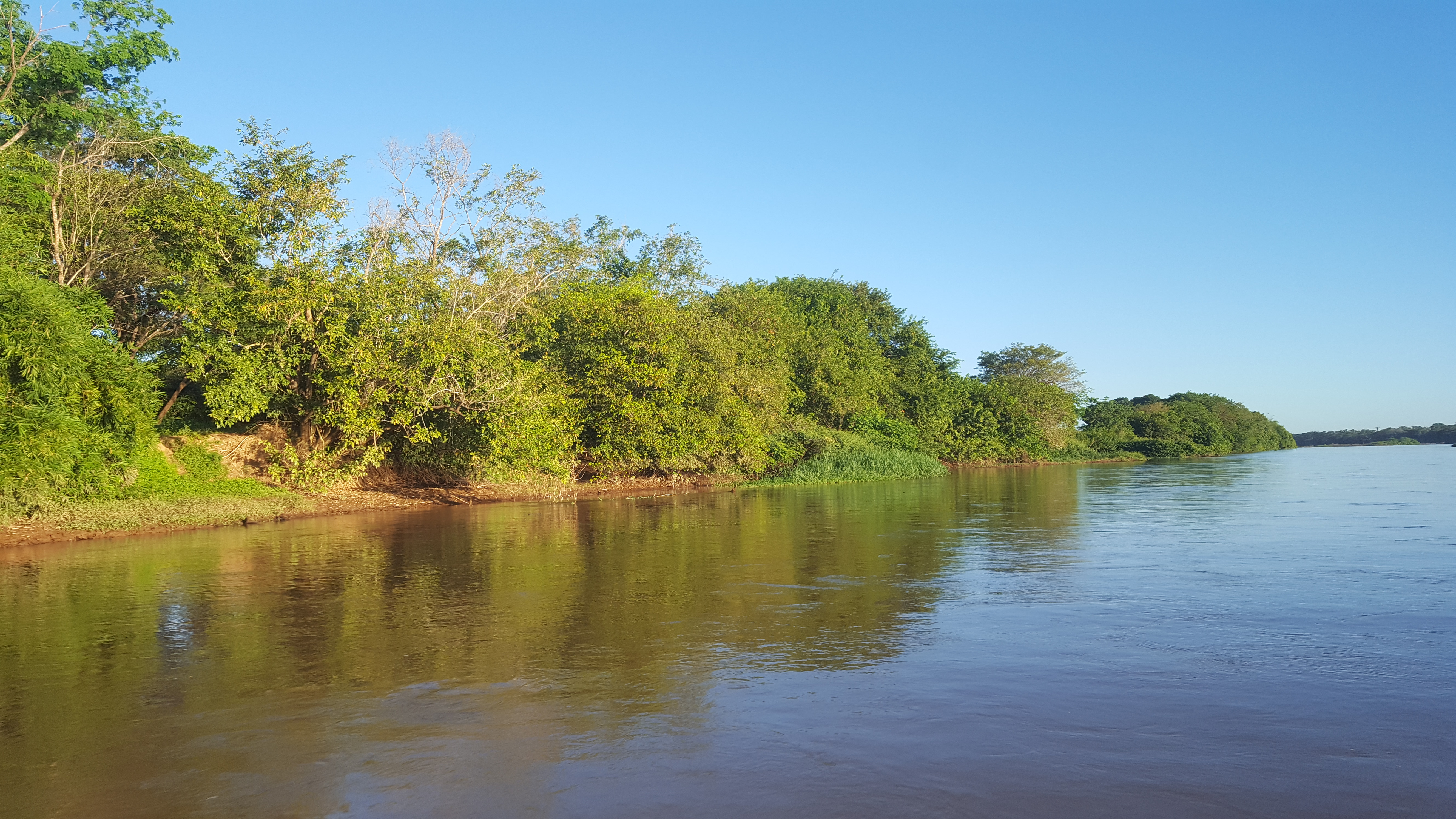 Imagem da vegetação das margens co rio Parnaíba na altura de Teresina, Piaui.